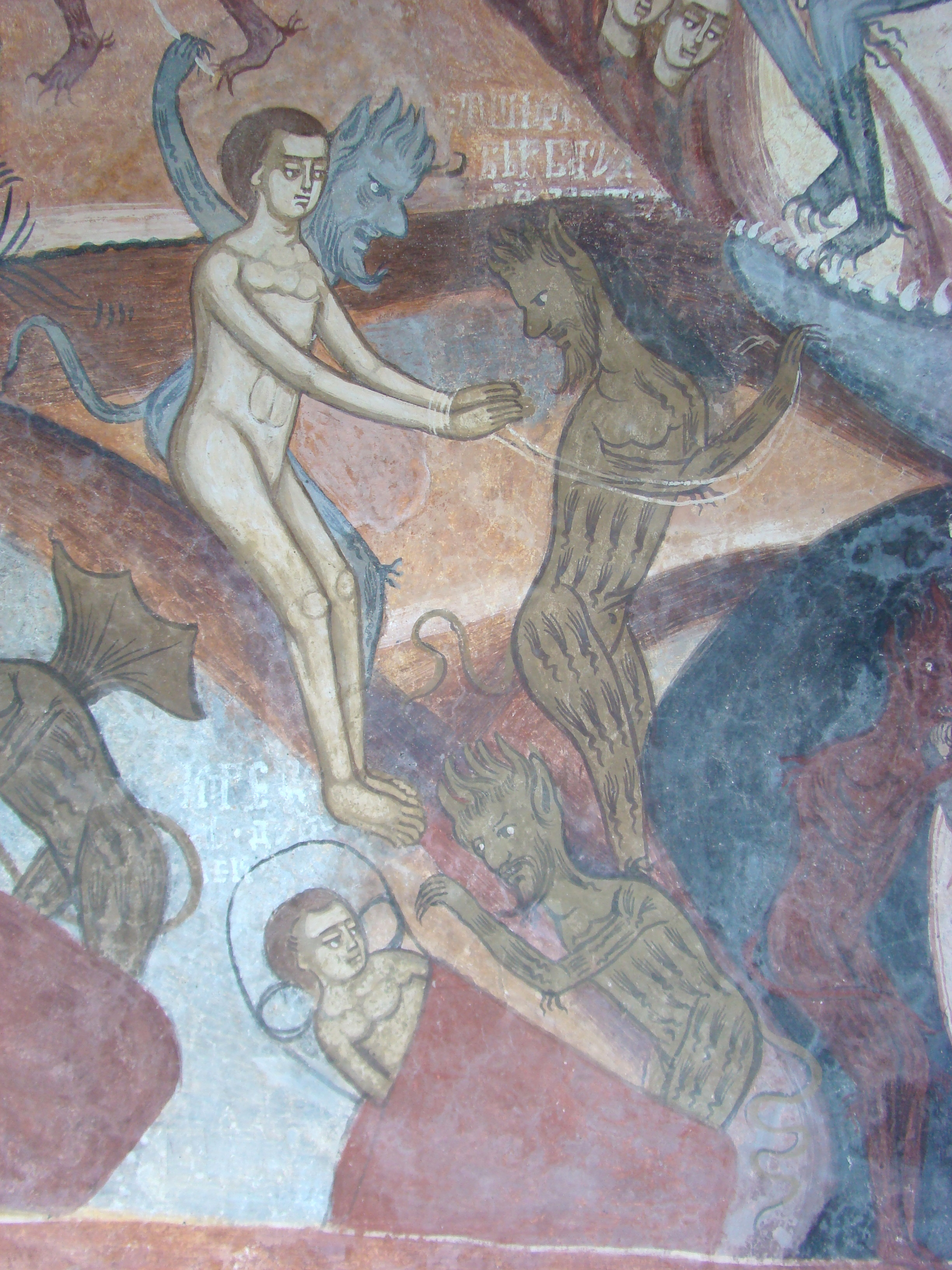 Biserica „Sfinţii Ioachim și Ana”, sat Târgu Logrești; comuna Logrești 01